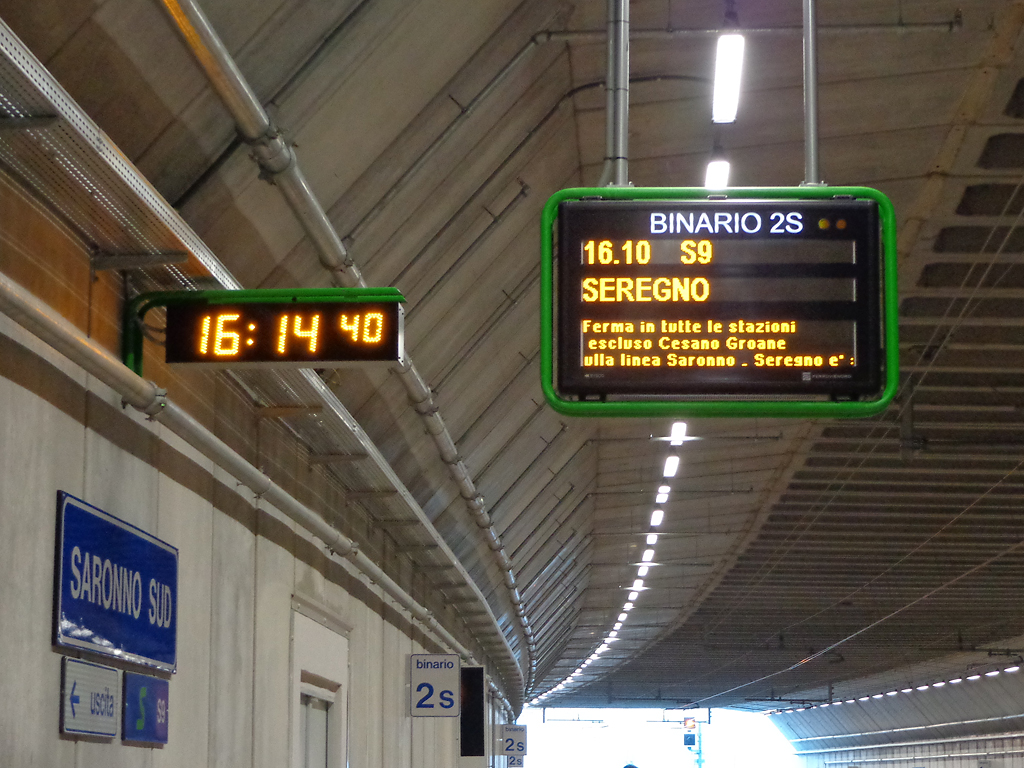 Stazione ferroviaria di Saronno Sud. Teleindicatori presenti sui marciapiedi sotterranei.